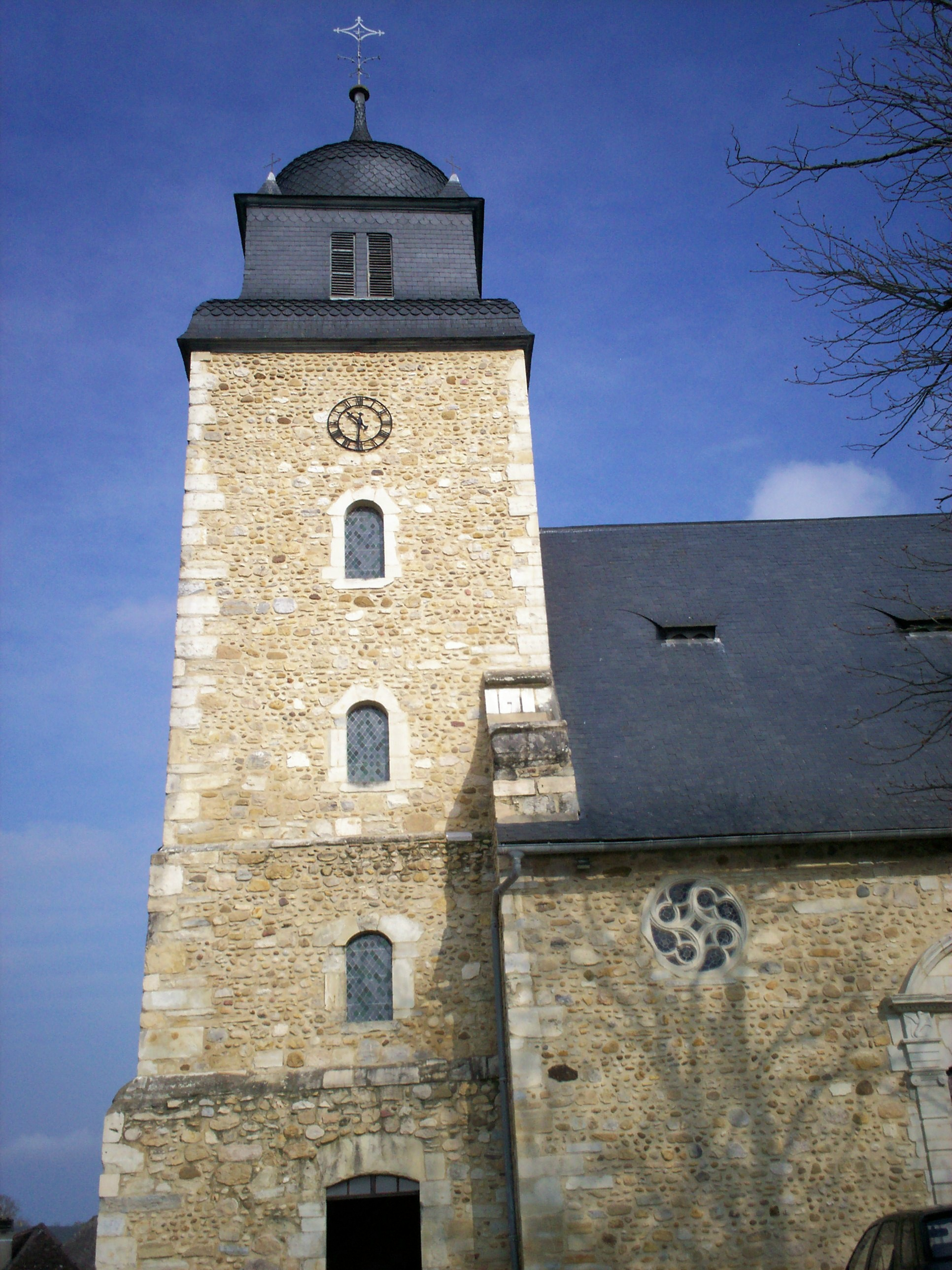 Glèisa de La Horcada